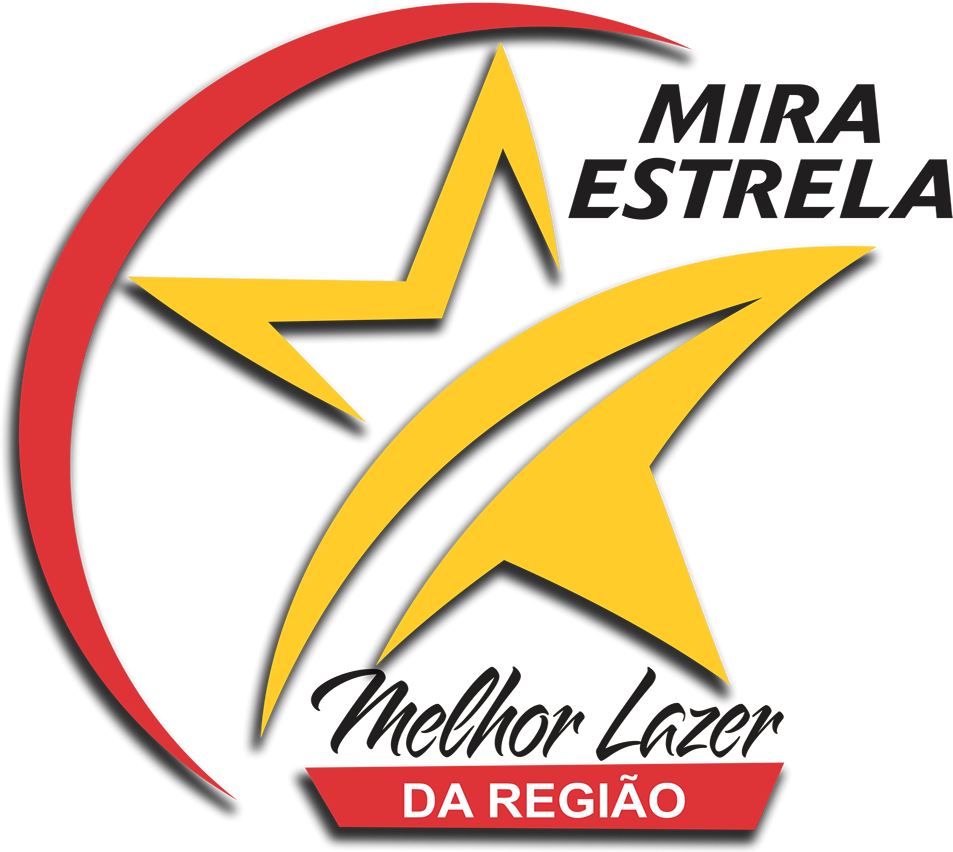 logo do municipio